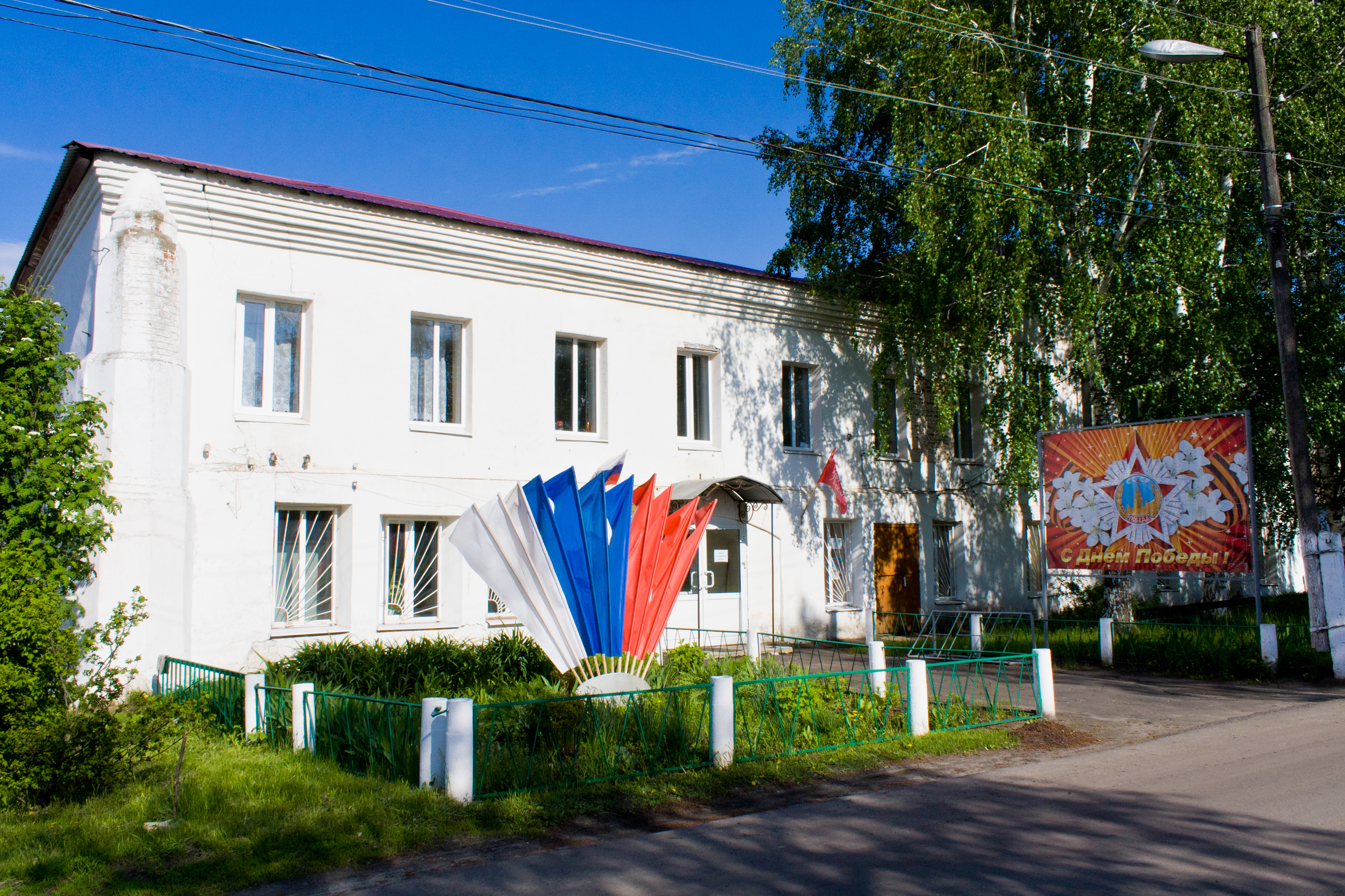 Детская школа искусств. 2020 год Беково